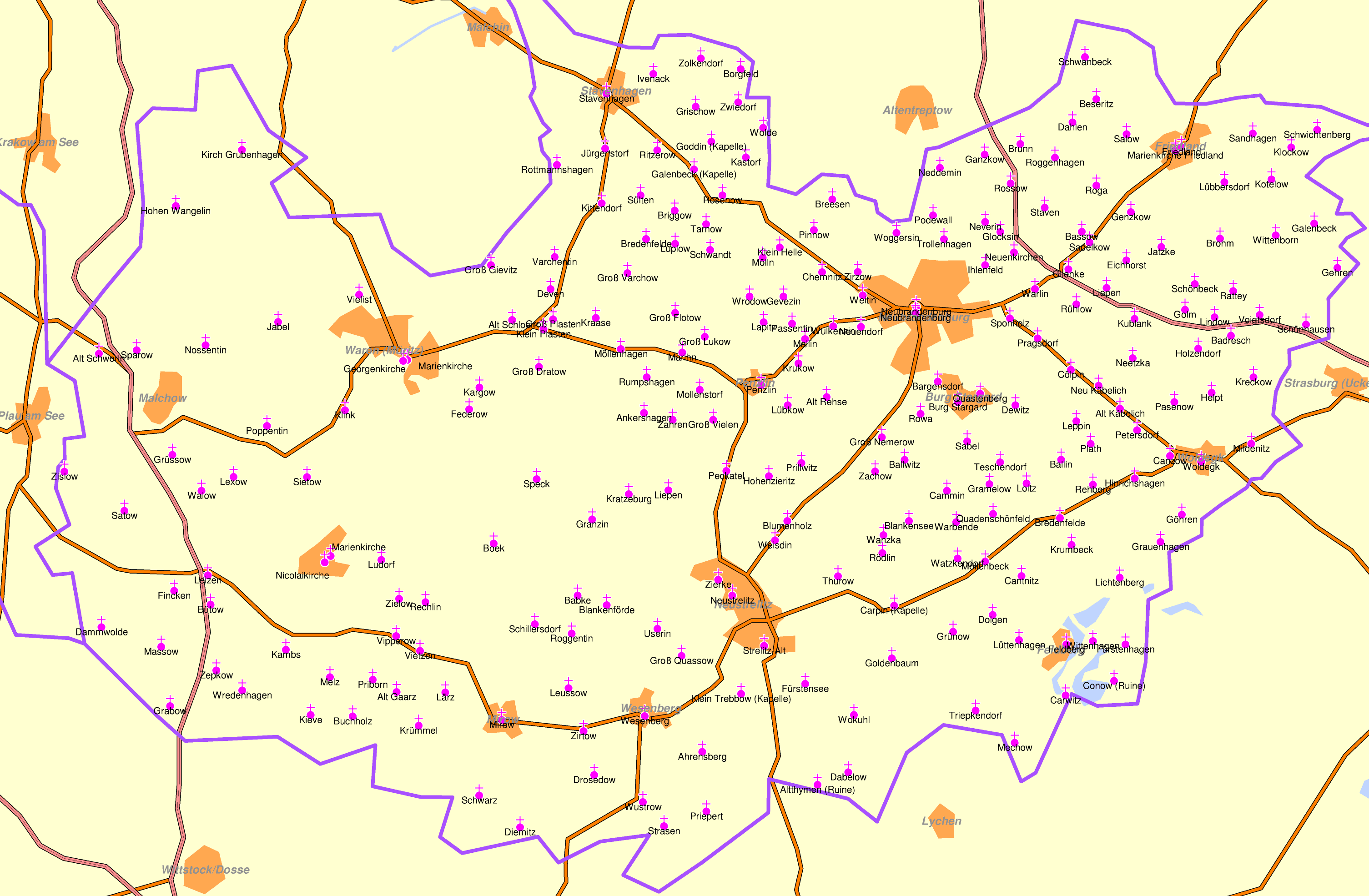 Karte der Propstei Neustrelitz im Kirchenkreis Mecklenburg der Nordkirche